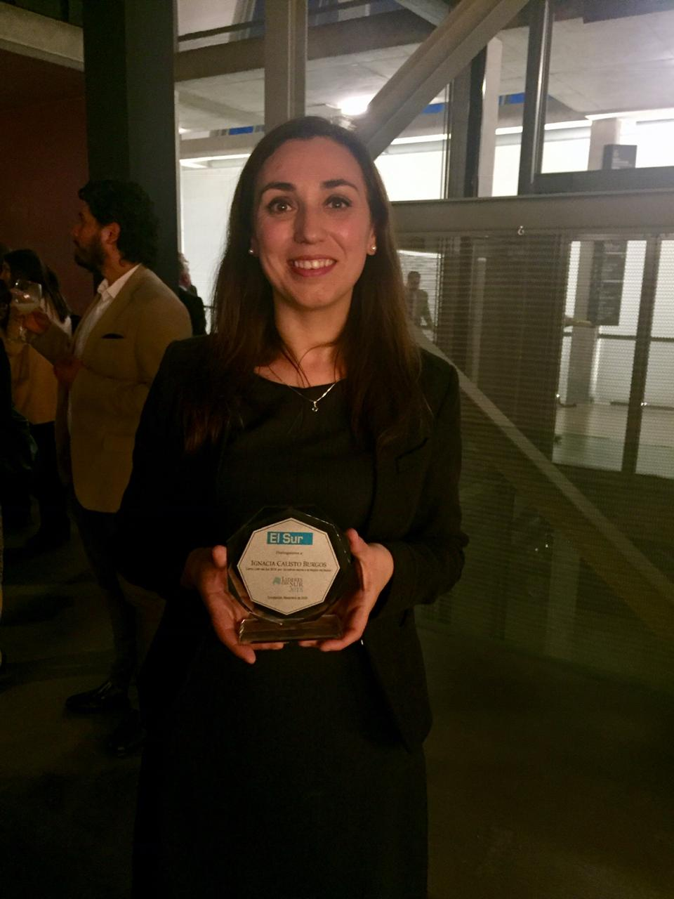 Investigadora chilena Ignacia Calisto recibiendo el premio Lider del Sur (2018)